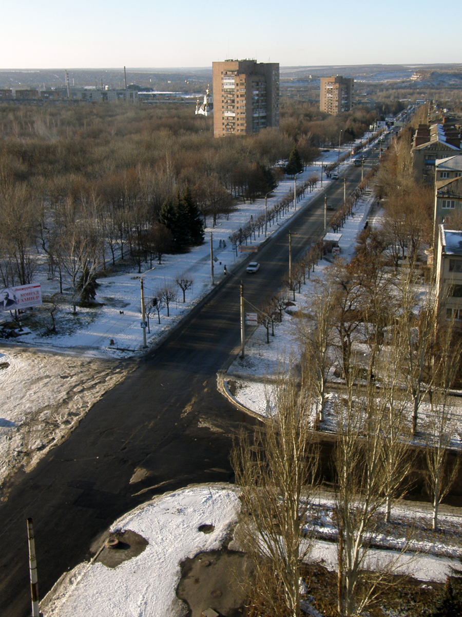 Краматорск